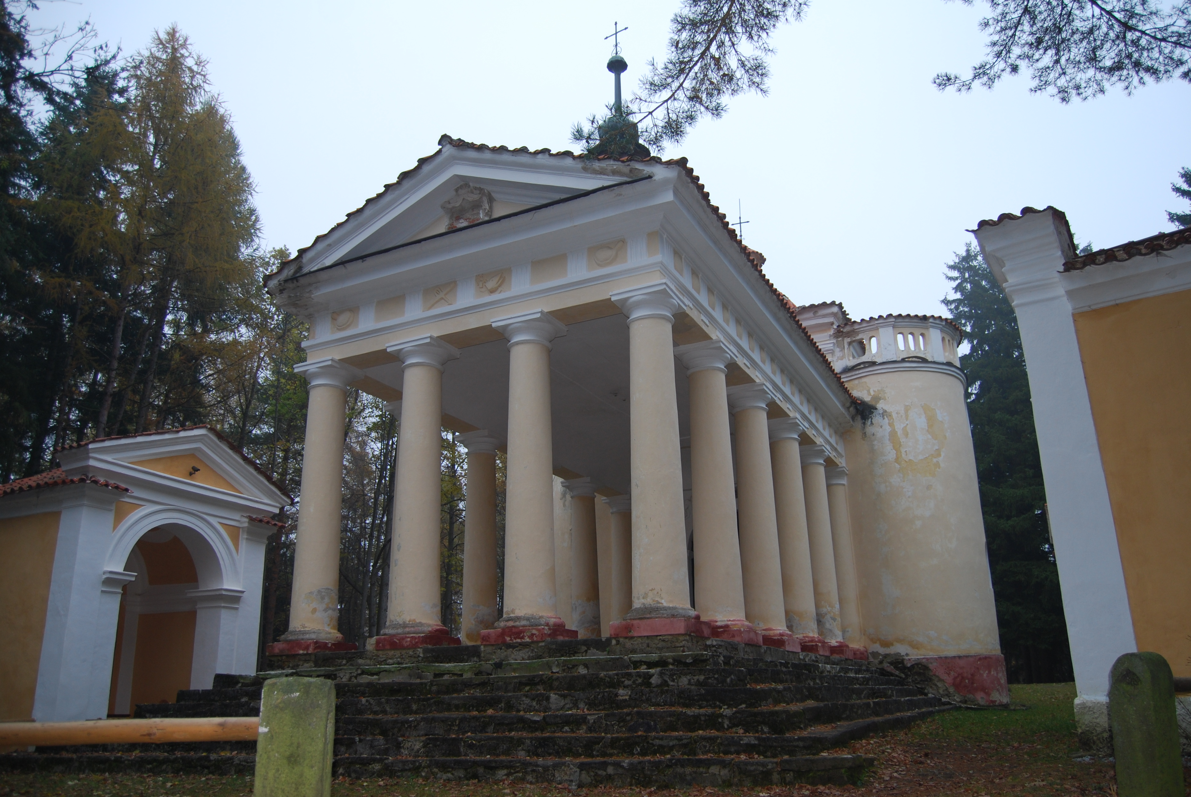 Ústřední kaple Kalvárie, zasvěcená Povýšení Sv.Kříže..Městys Čestice.Okres Strakonice.Česko.